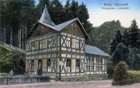 Lochmühle zwischen Biber und Wiesen vor dem Ersten Weltkrieg